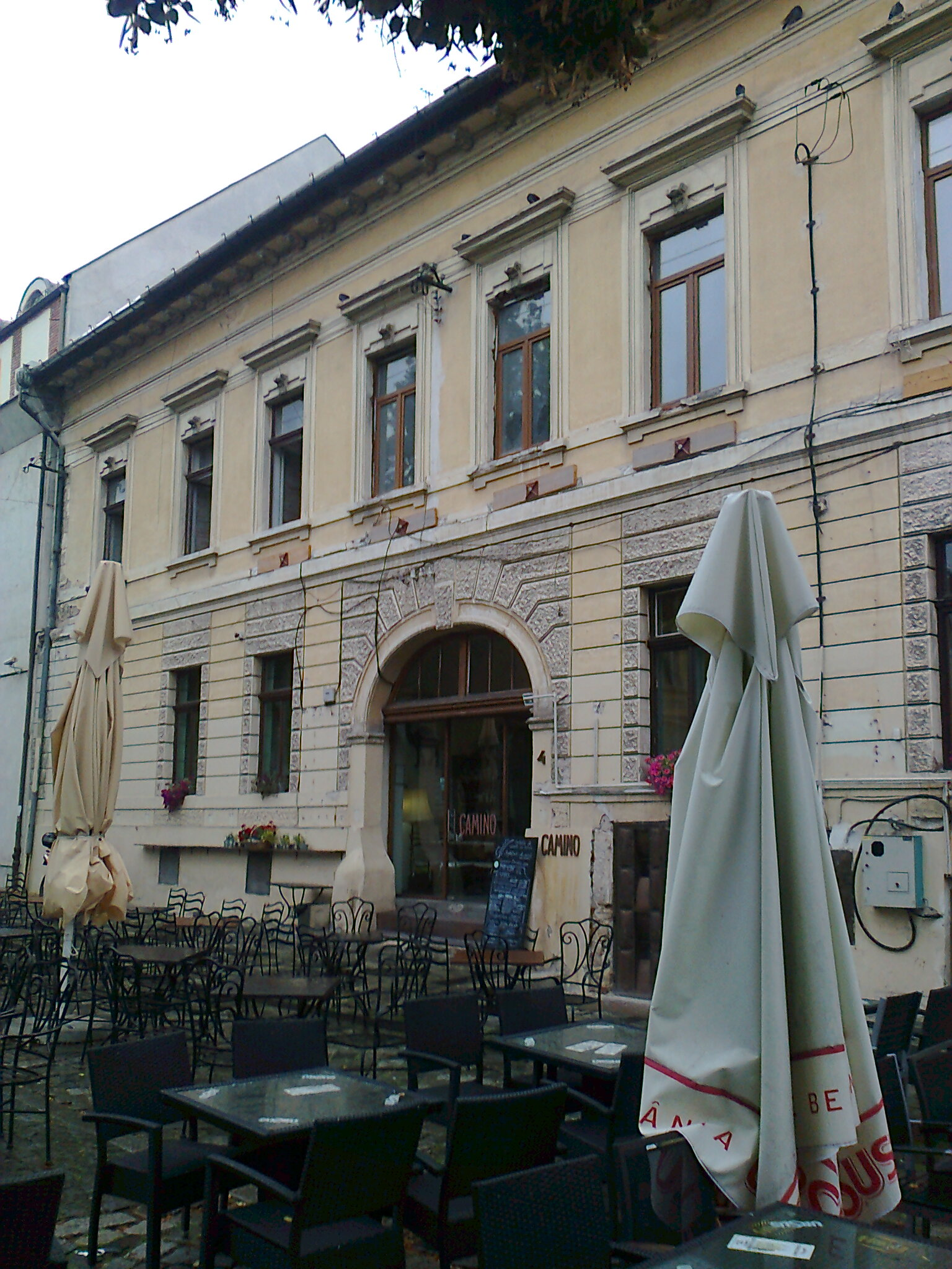 Palatul Mikes din Cluj